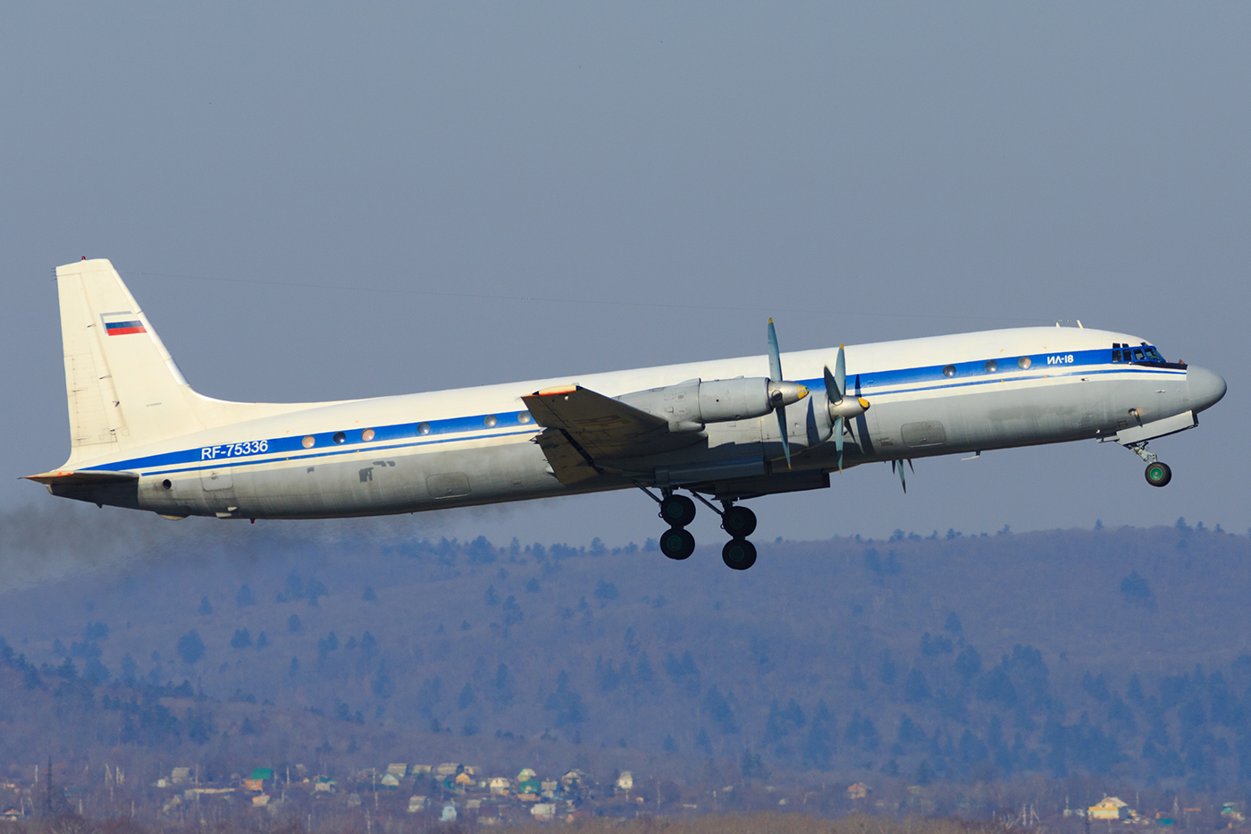 VVO_0631